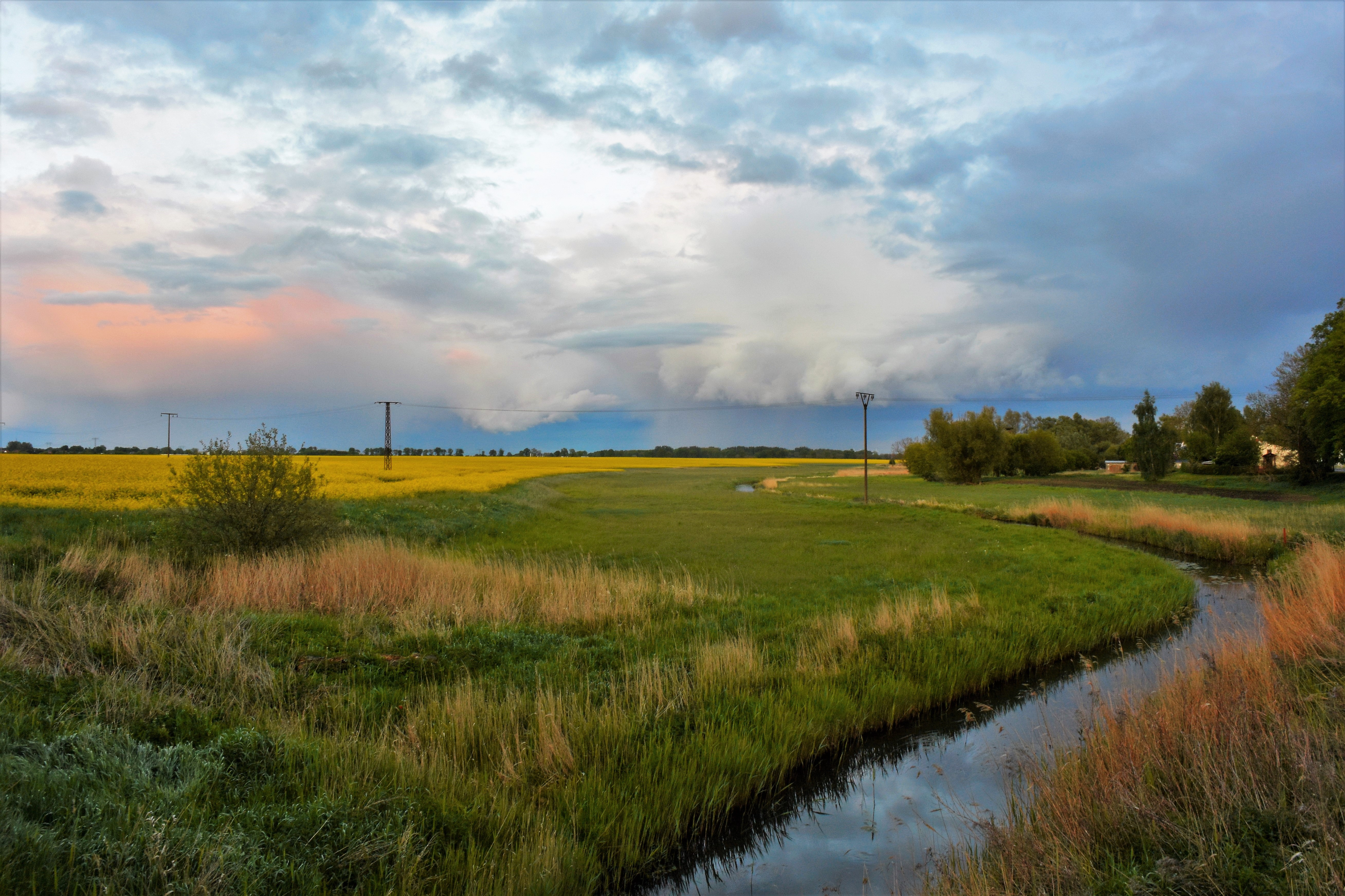 Der Stegenbach bei Görke (Ortsteil von Postlow) fließt in die Peene, Blick in südöstliche Richtung bachaufwärts; der Bach bildet hier die Gemeindegrenze zwischen Anklam (links im Bild) und Postlow (rechts); Gewässerrandstreifen